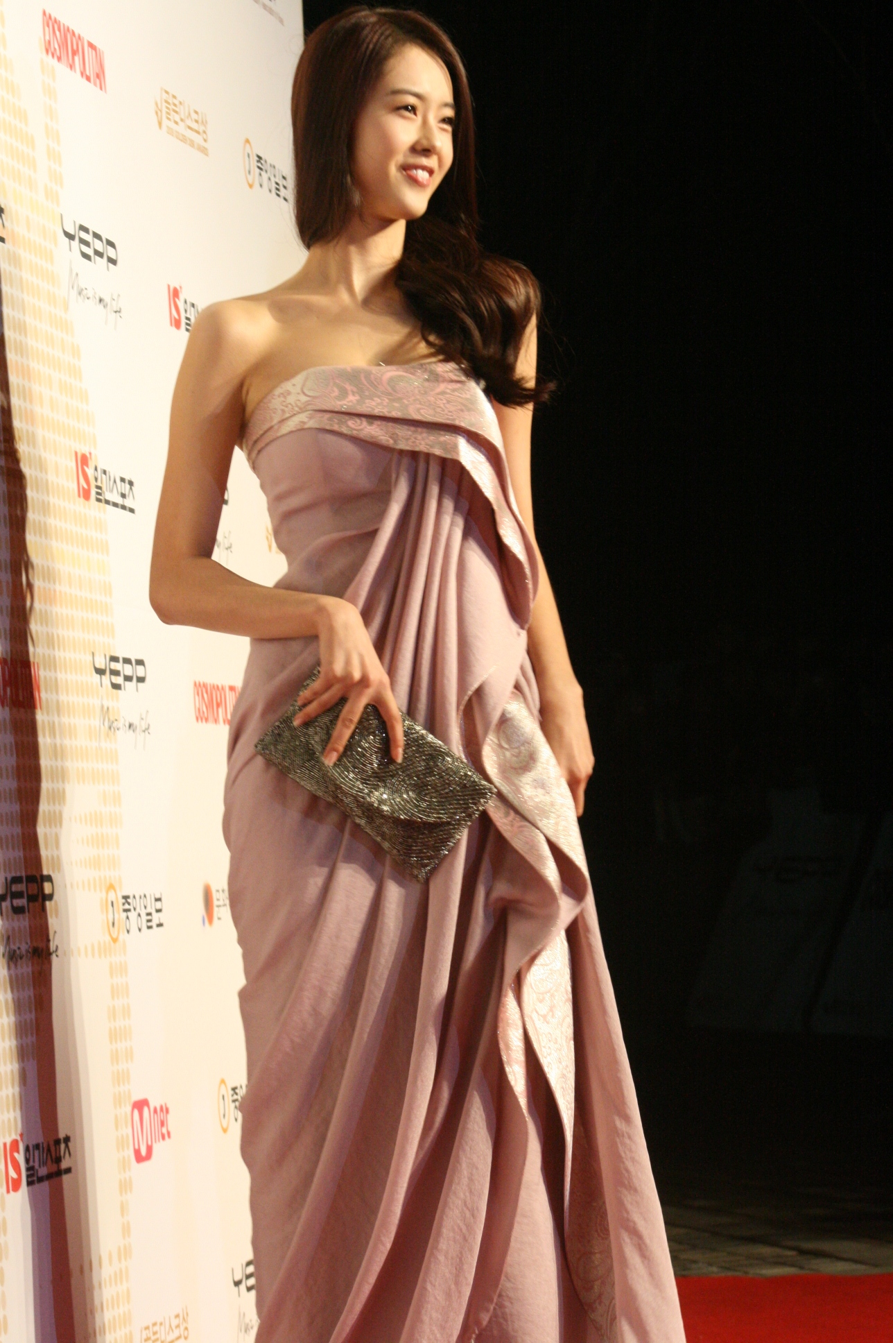 2008 골든디스크 시상식